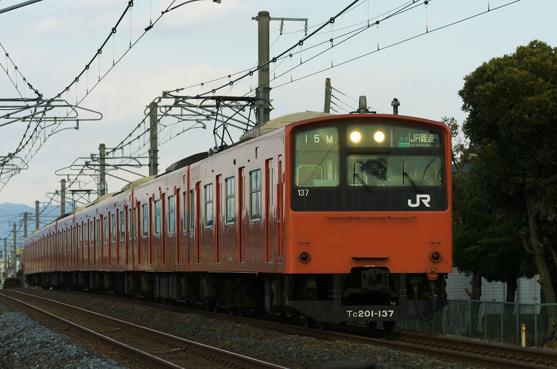 JR大和路線 法隆寺ー王寺間を走る区間快速